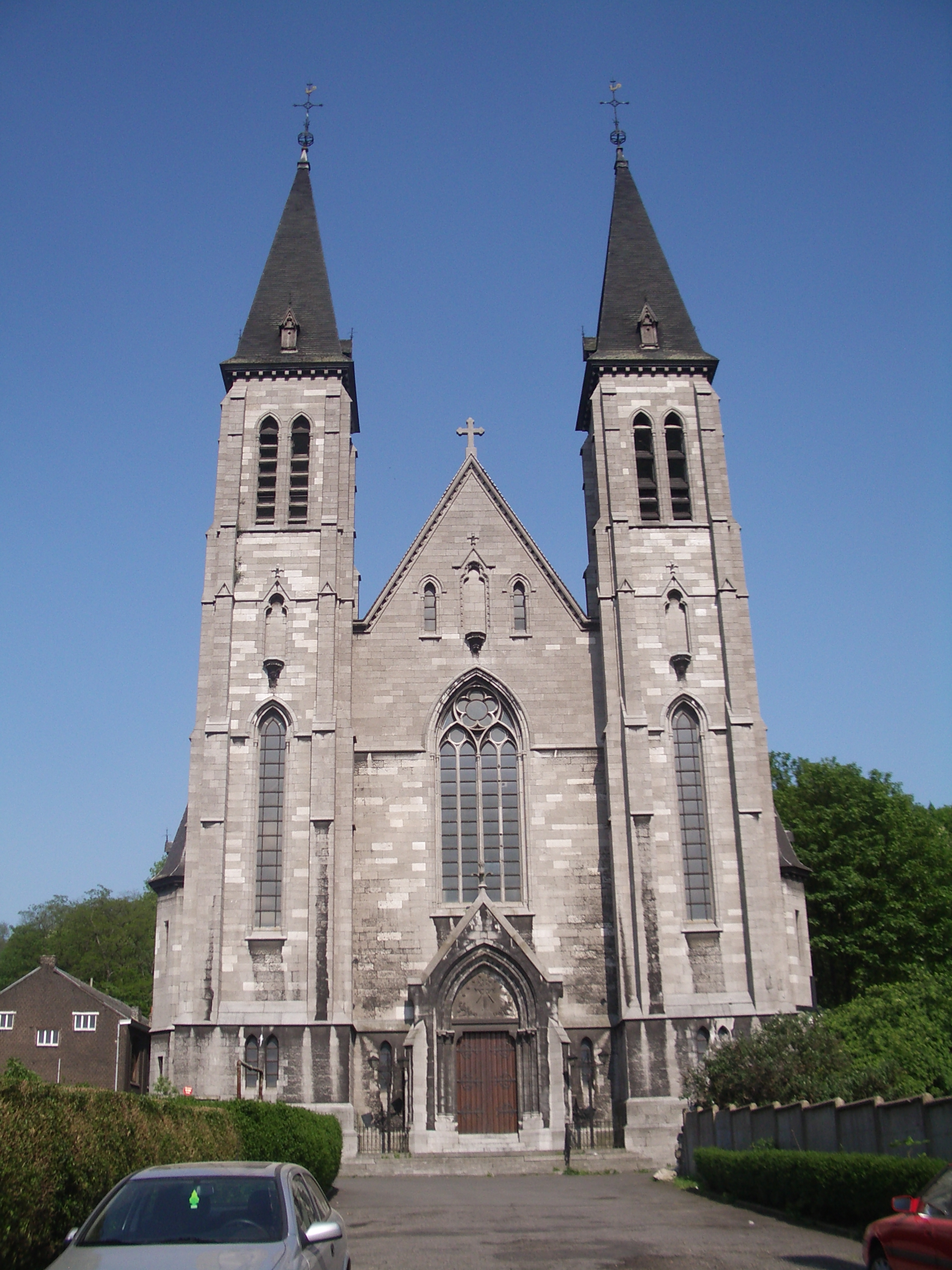 Façade principale. Eglise à Grivegnée